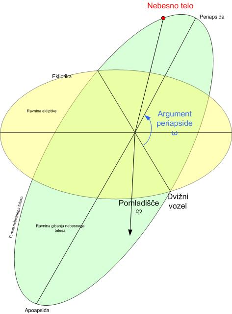 Argument periapside za ekliptiko.